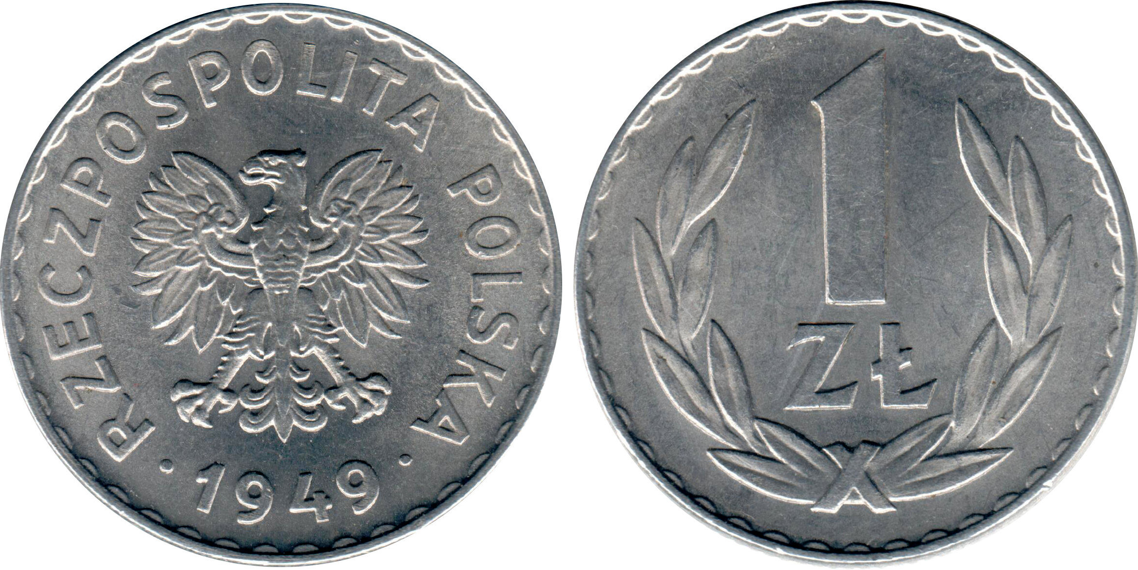 1 zloty 1949 Al